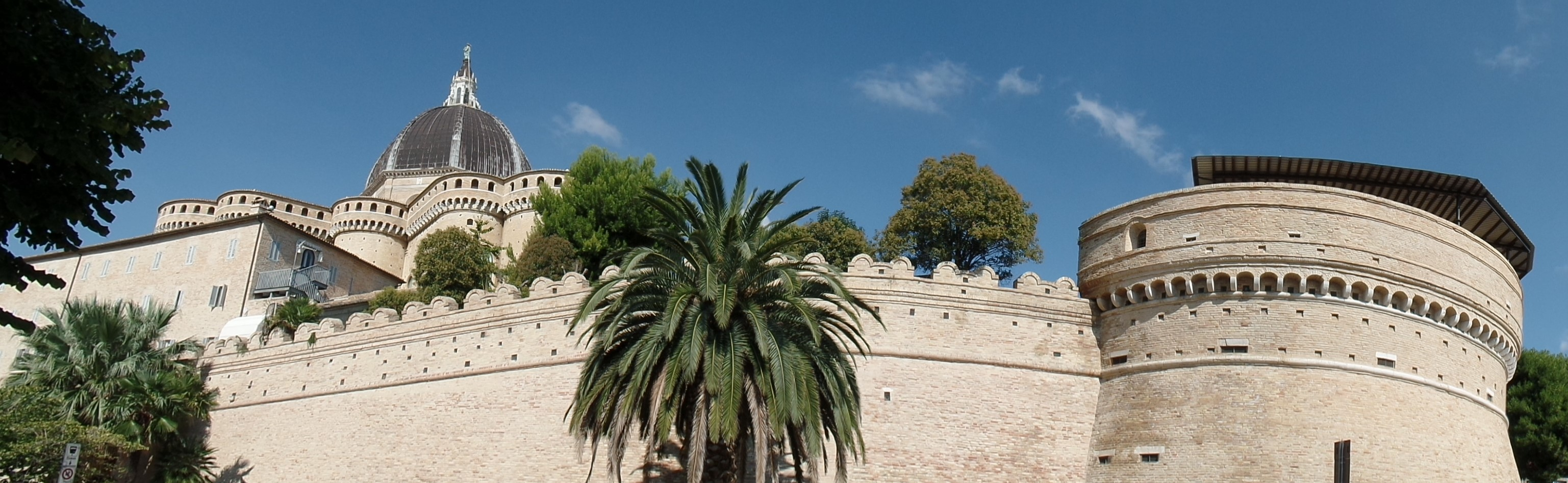 Basilica Loreto vista con Torrione